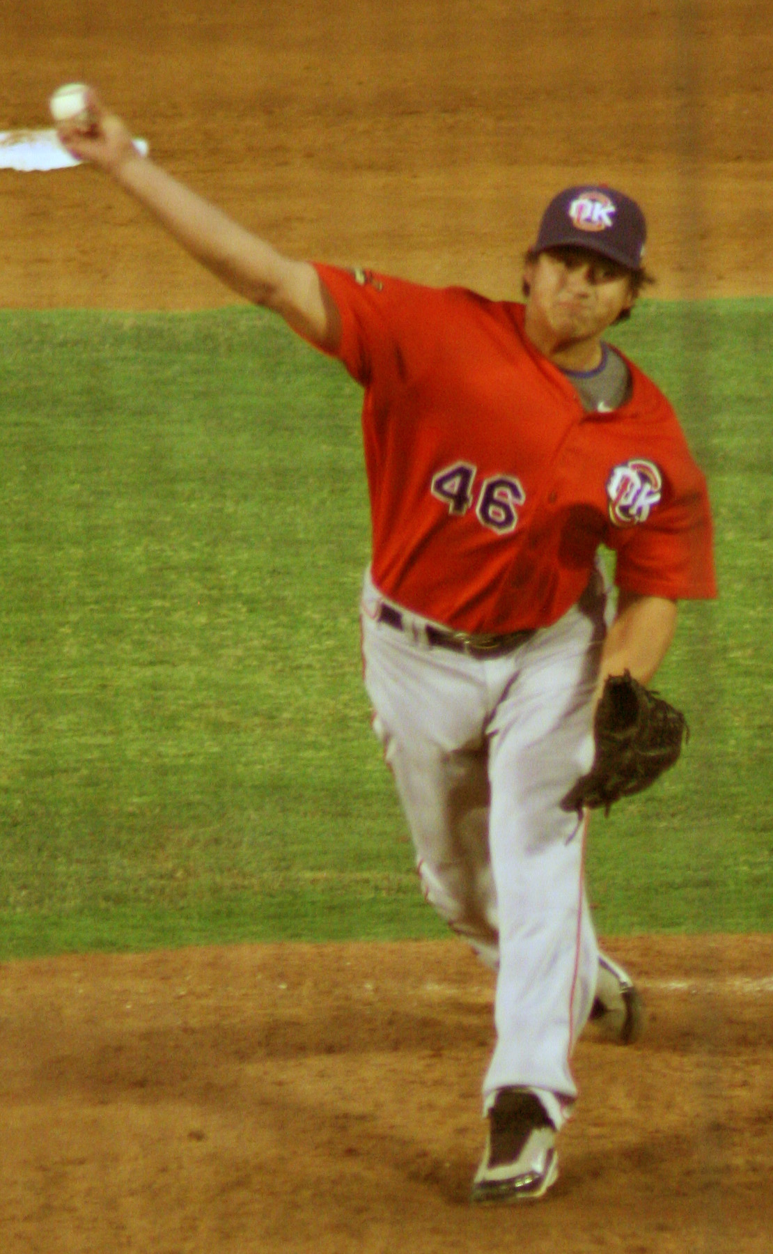 Luis Mendoza